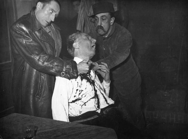 Série sur le Grand guignol : scène : [photographie de presse]